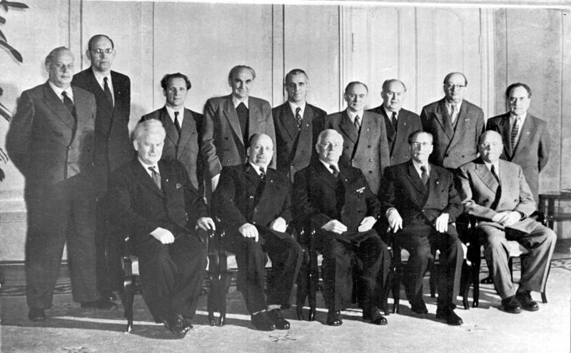 Zentralbild/Heilig-Weiß, 20.4.1955 Das Politbüro der Sozialistischen Einheitspartei Deutschlands 1. Reihe (von links nach rechts): Die Mitglieder des Politbüros Hermann Matern; Walter Ulbricht; Wilhelm Pieck; Otto Grotewohl; Karl Schirdewan. 2. Reihe (von links nach rechts): Die Kandidaten des Politbüros Herbert Warnke; Alfred Neumann; Erich Honecker; die Mitglieder des Politbüros Heinrich Rau; Willi Stoph; Fred Oelßner; der Kandidat des Politbüros Erich Mückenberger; das Mitglied des Politbüros Friedrich Ebert und der Kandidat des Politbüros Bruno Leuschner.